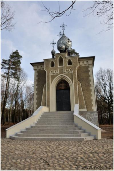 Cerkiew Chróścinie po Remoncie